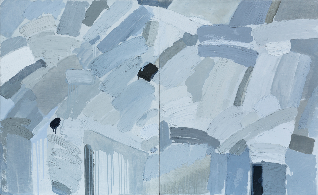 Sonia Jakuschewa, Bez názvu I, II, 2007, olej a akryl na plátně, 96 x 85 cm, foto Dirk Eisermann